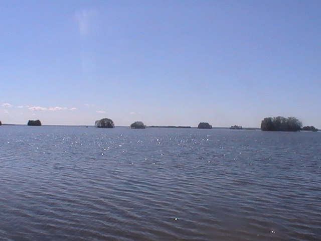 Säkylän Pyhäjärvi Kesällä 2010. (Kesä oli erittäin kuuma ja samalla koko Suomen historian lämpimin).